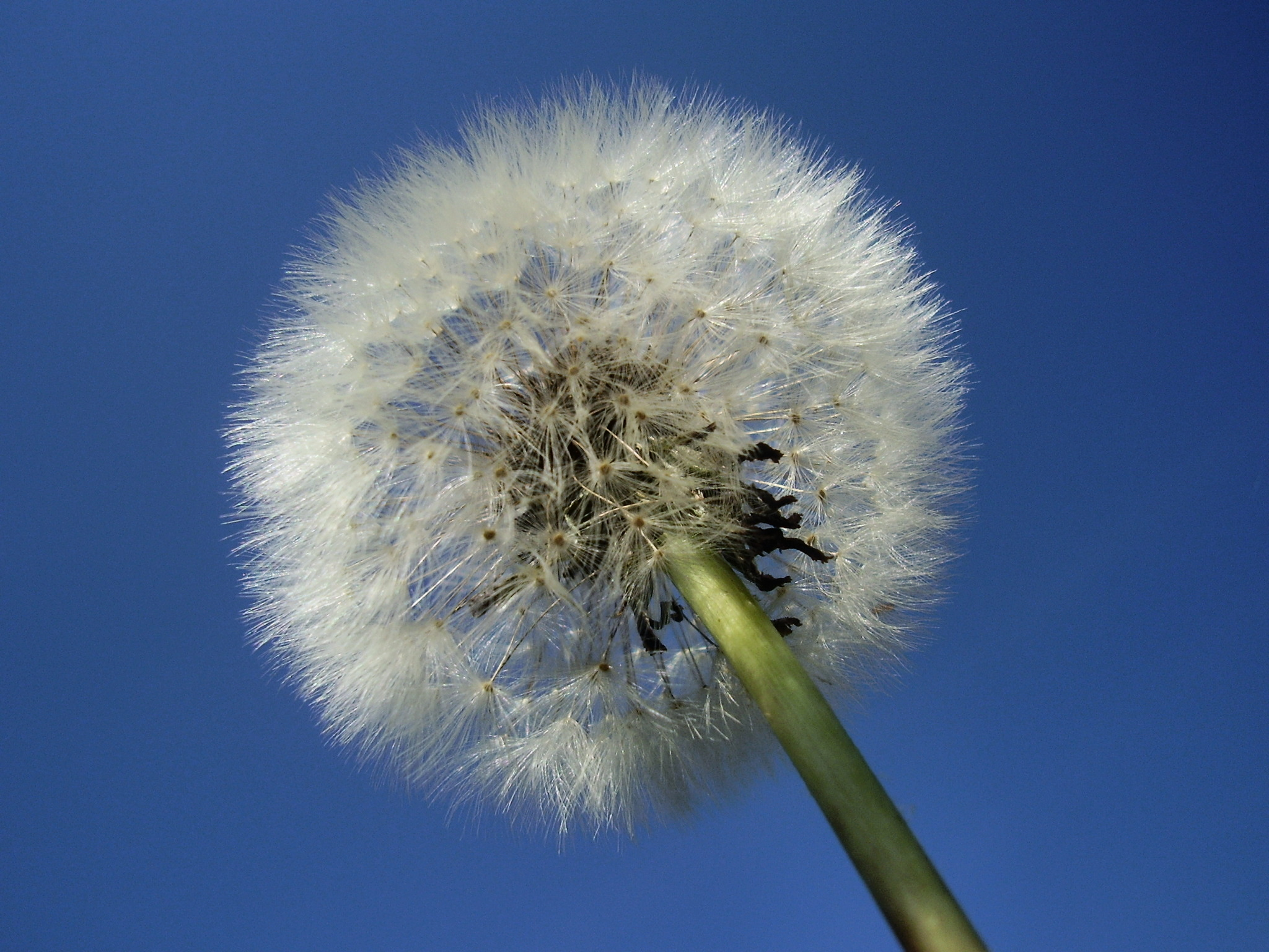 Dandelion clock